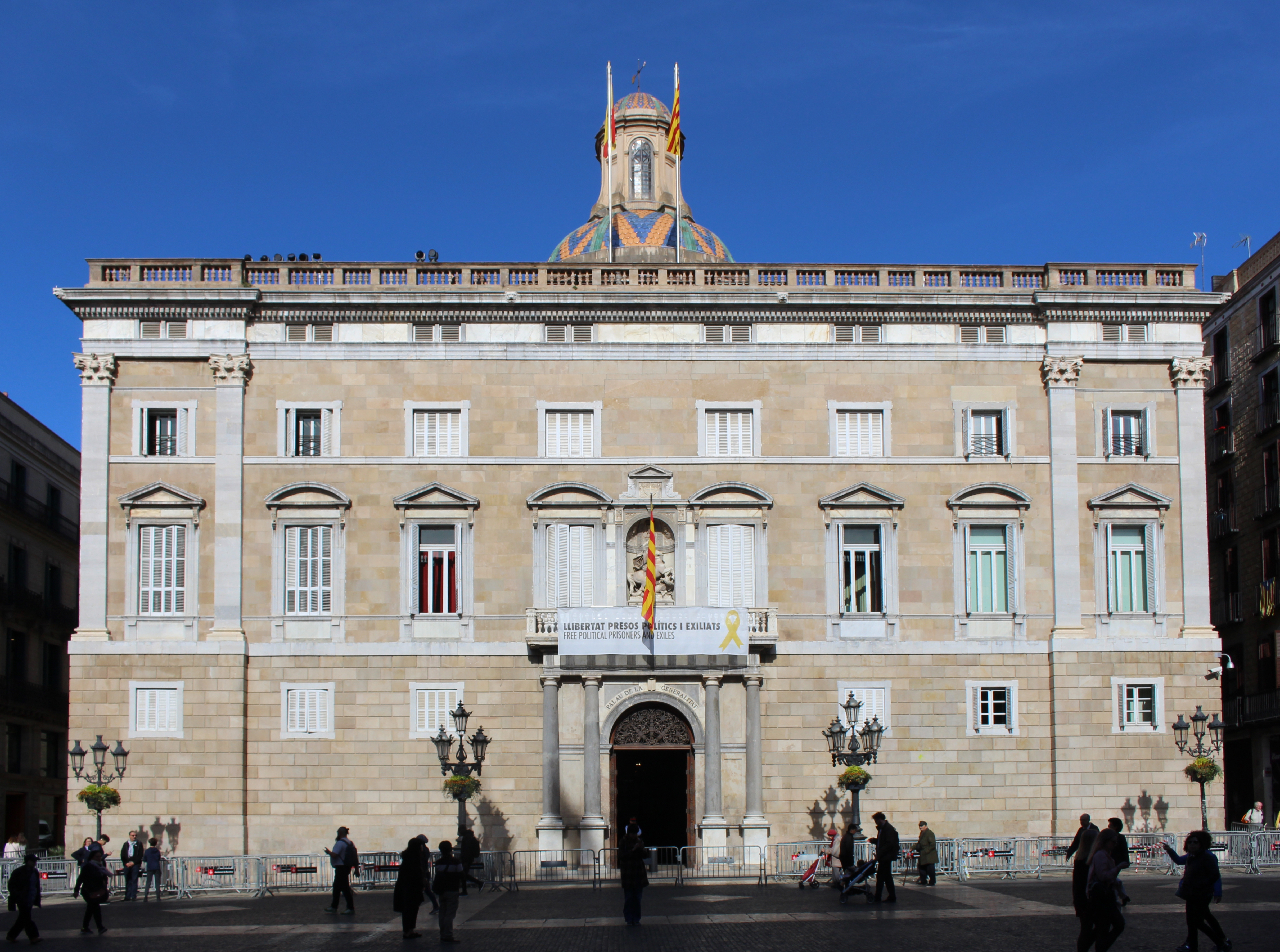 Palais de la Généralité de Catalogne, Barcelone.